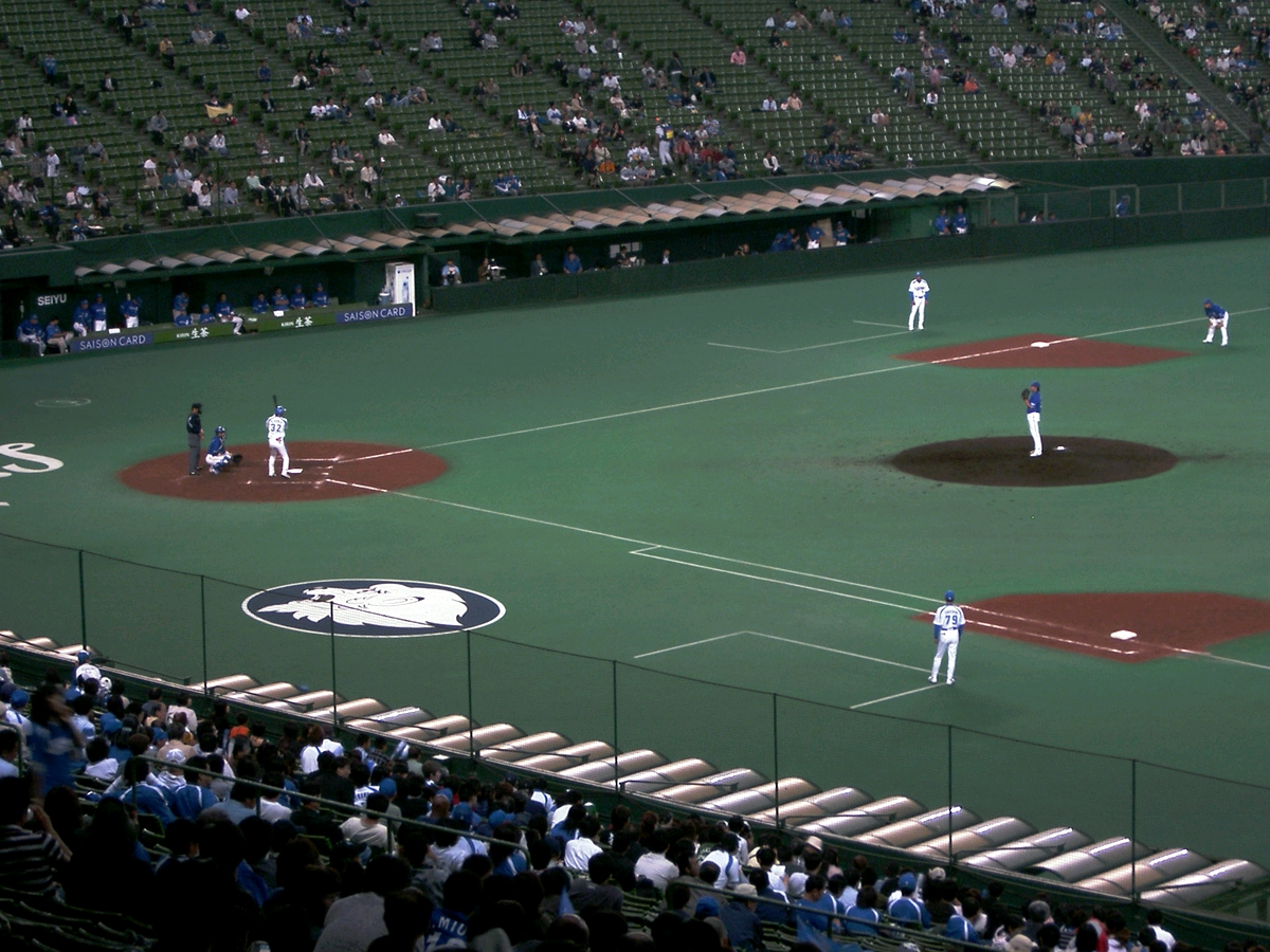 “Seibu Dome” Seibu Lions professional baseball team located in Tokorozawa, Saitama, Japan. “西武ドーム” 日本の埼玉県所沢市にあるドーム式野球場。日本のプロ野球パリーグに加盟する、西武ライオンズのホーム球場でもある。西武ライオンズ対横浜ベイスターズ・セパ交流戦第1試合で西武2,横浜1で西武の勝利。西武ライオンズ・石井義人内野手が打席で構える様子を内野席から撮影。